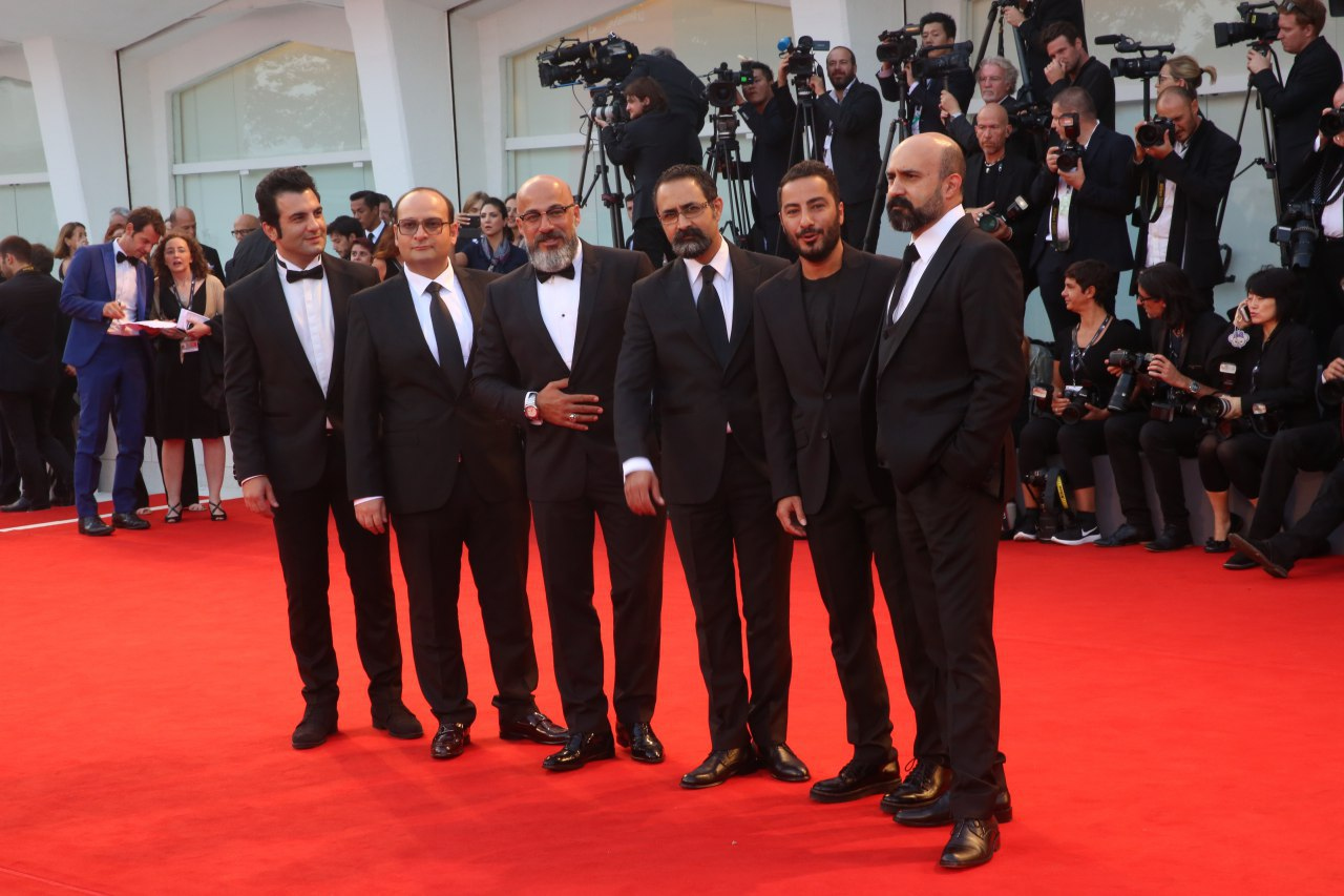 Red carpet venice film festival 2018